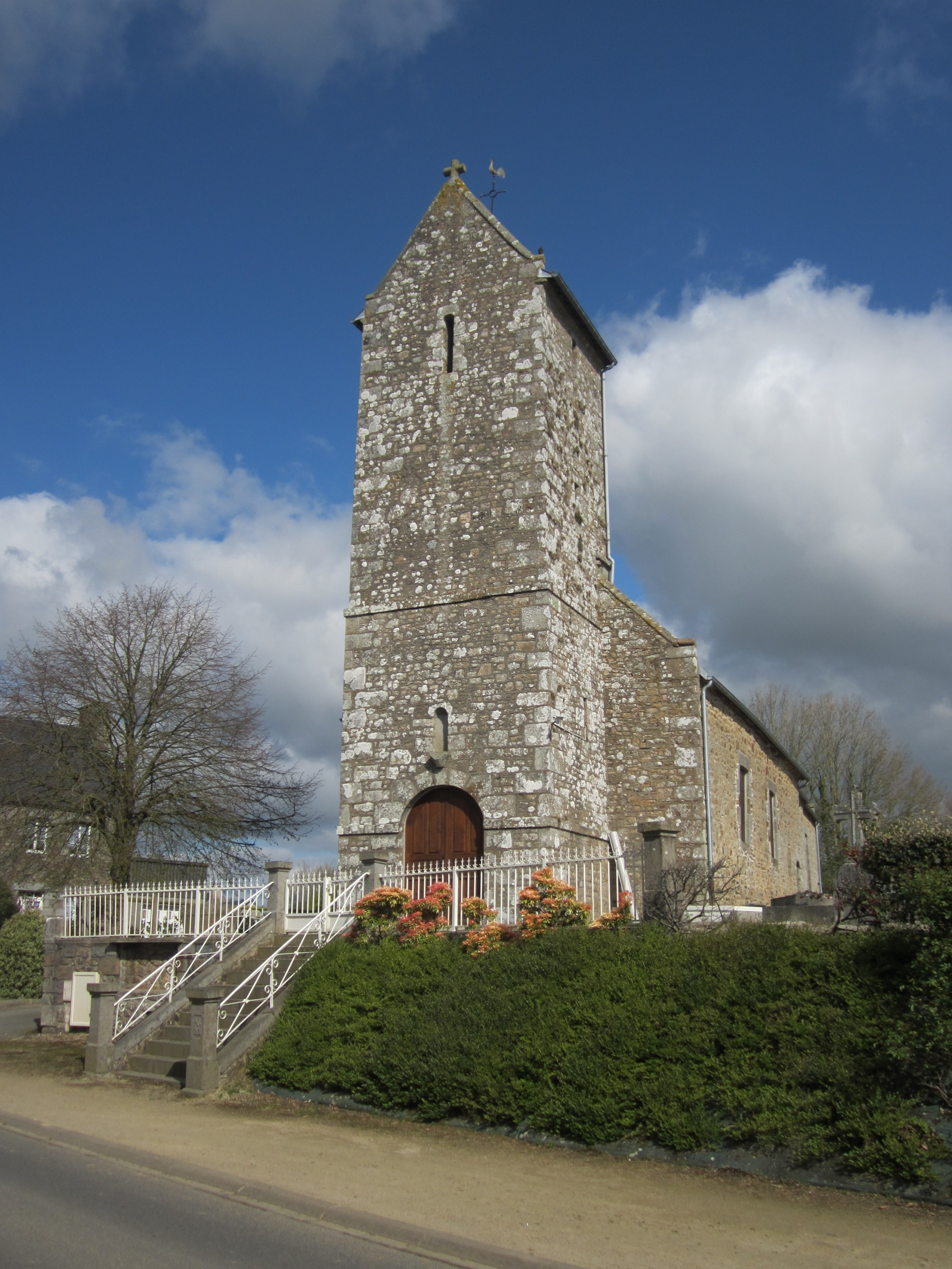 Les Chambres, MAnche